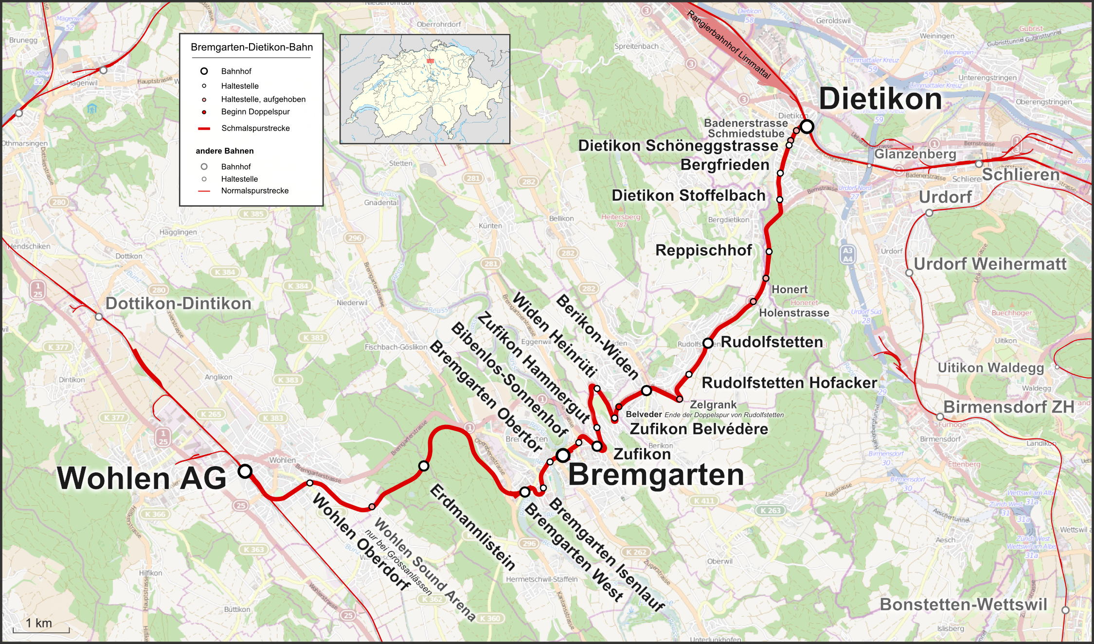 Karte der Bremgarten-Dietikon-Bahn in der Schweiz